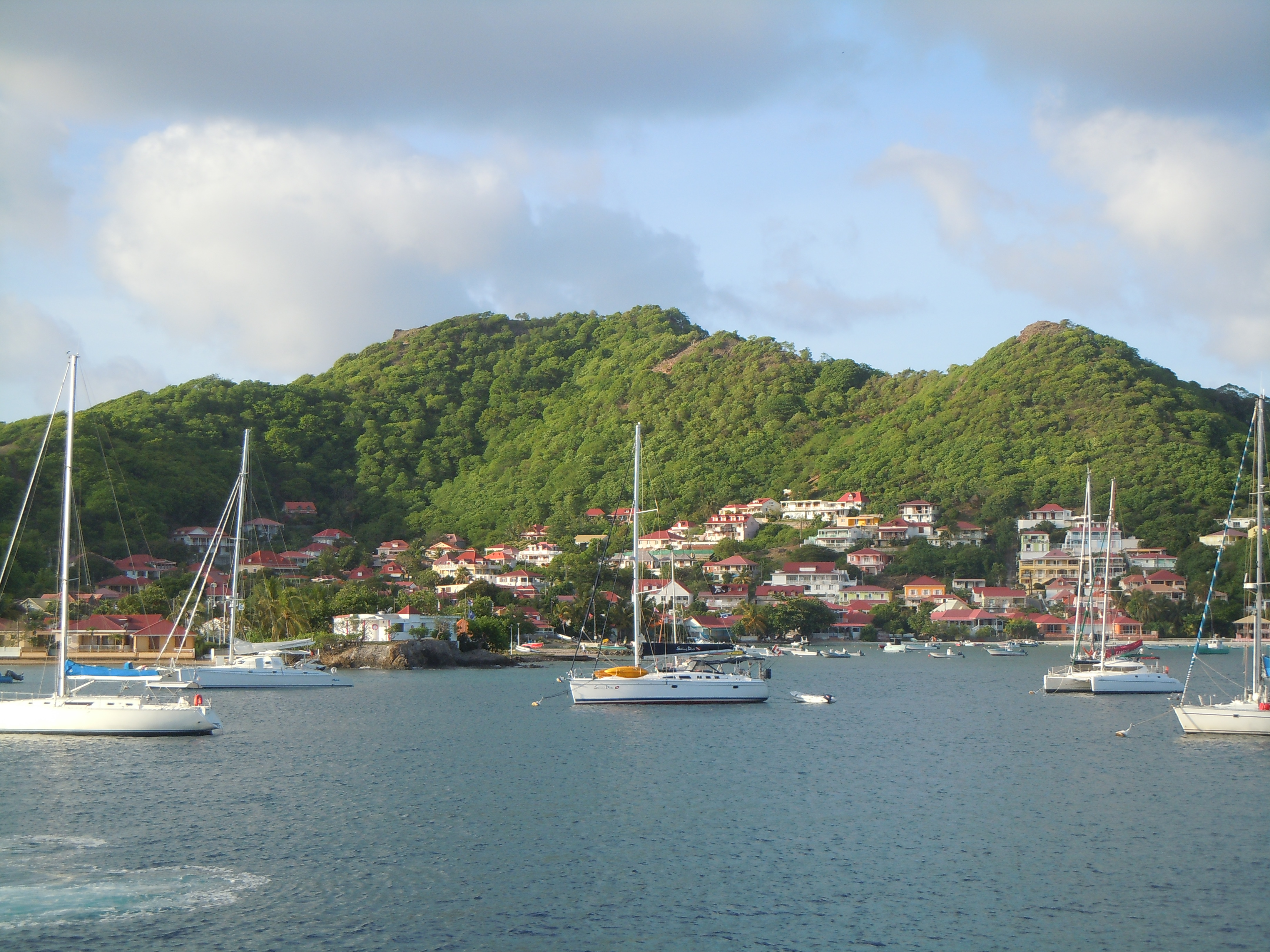 Anse du Fond-Curé au pied du Morne à Craie, Les Saintes